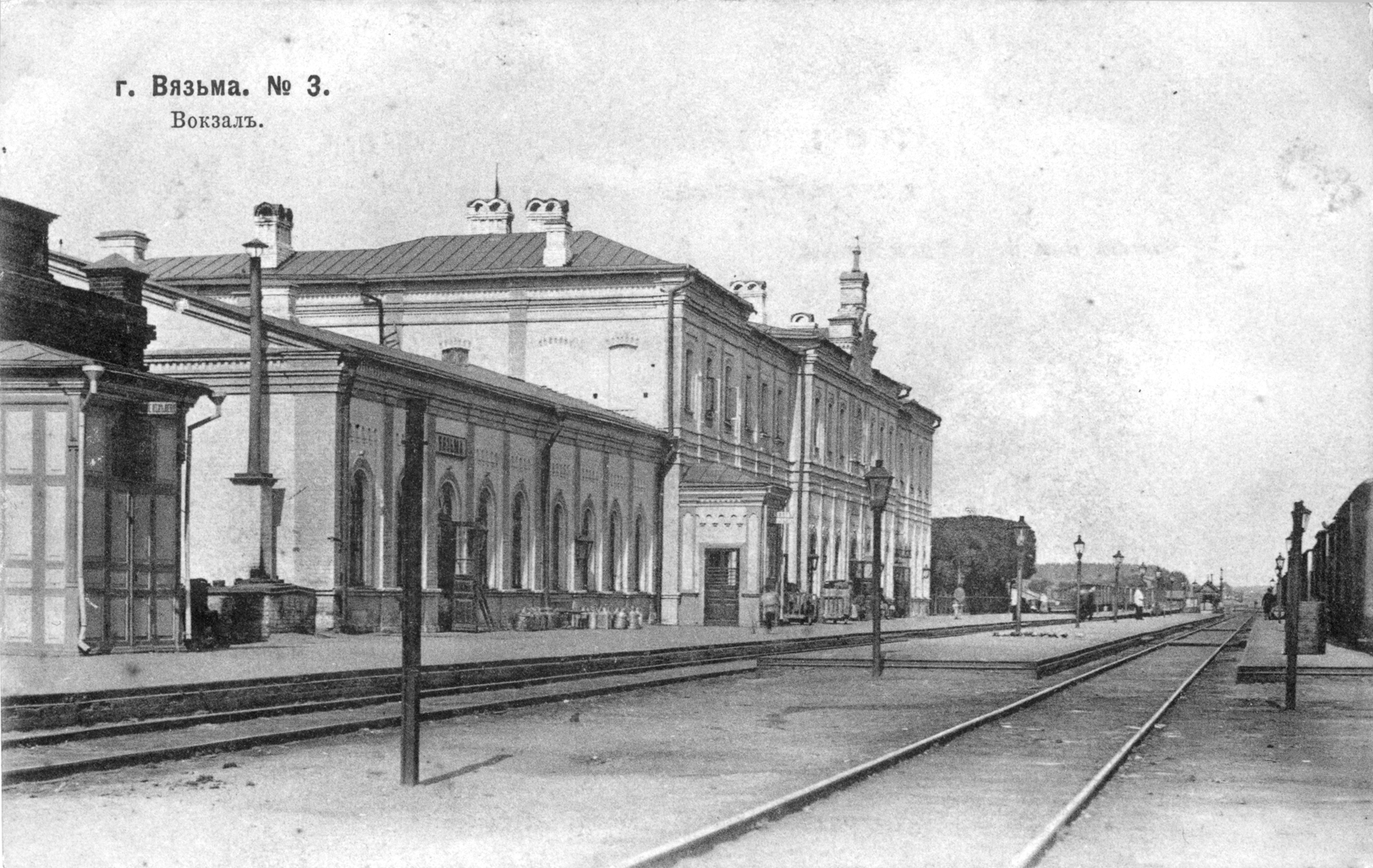 Вокзал станции Вязьма. Вид со стороны путей. Дореволюционная открытка.